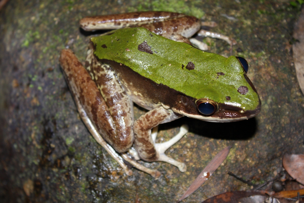 Green Cascade Frog, Odorrana chloronota. Taken in Tai Po Kau.